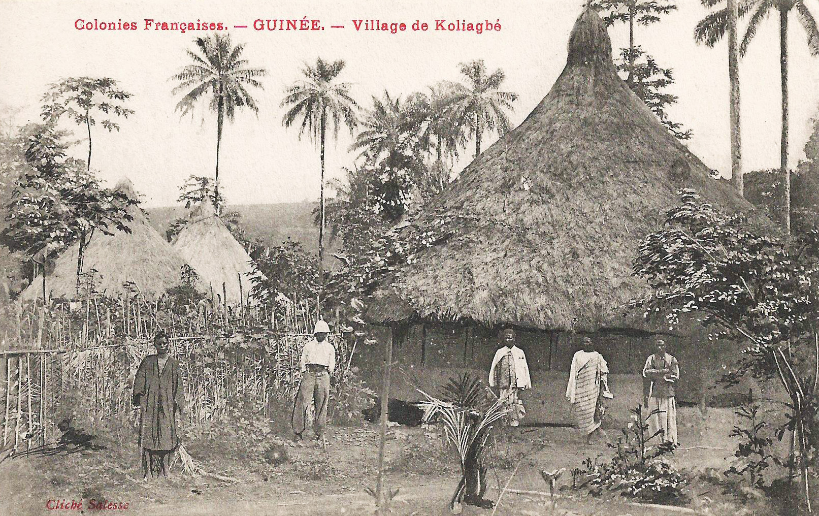 Village de Koliagbé. Cliché Salesse. Colonies françaises. Guinée